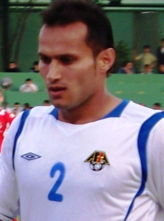 футболист Раиль Меликов (Азербайджан)